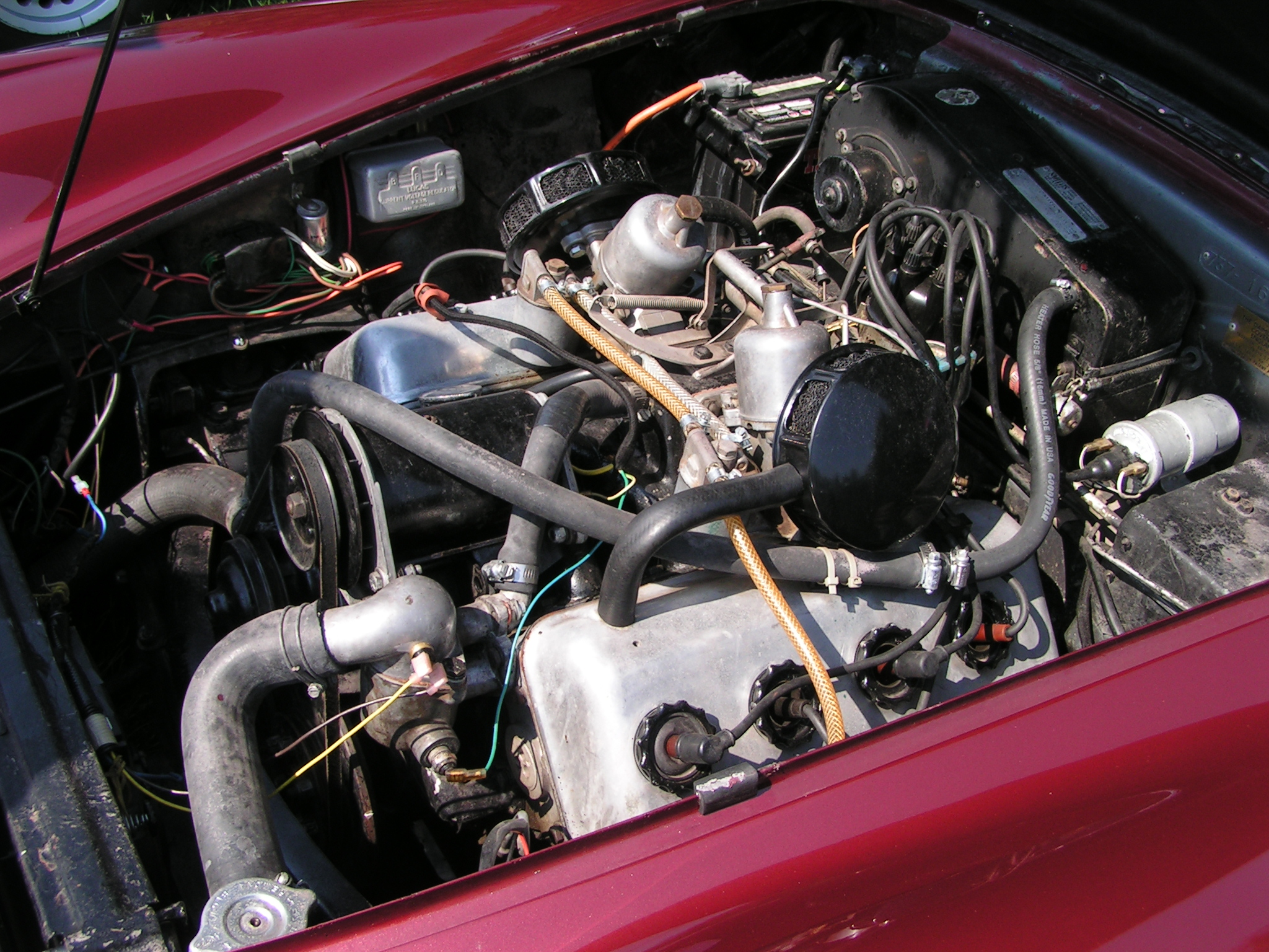 A 2.6L hemi head Daimler V8 engine.